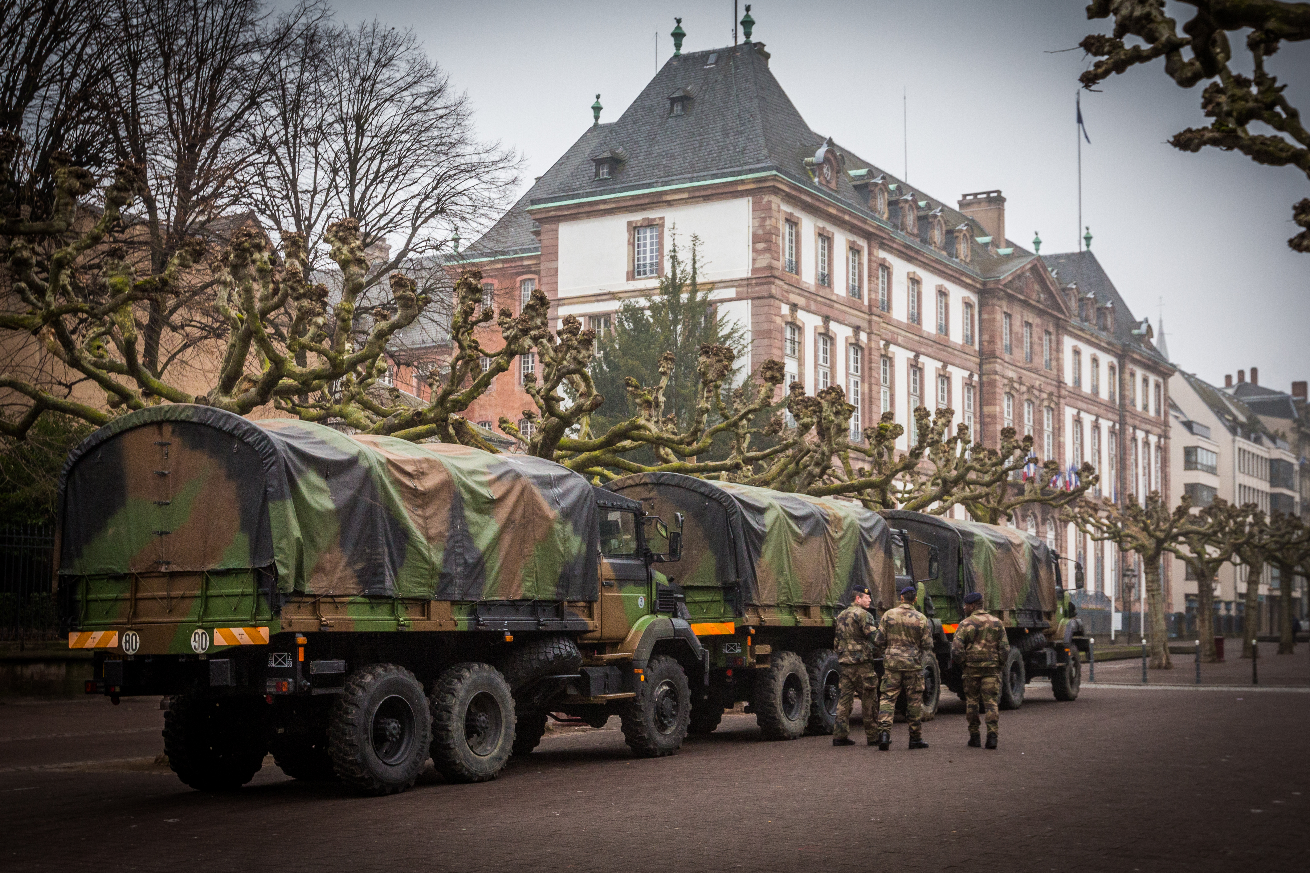 Camions du 35e régiment d'infanterie (7e brigade blindée} à Strasbourg opération pour l'opération Sentinelle en février 2015.